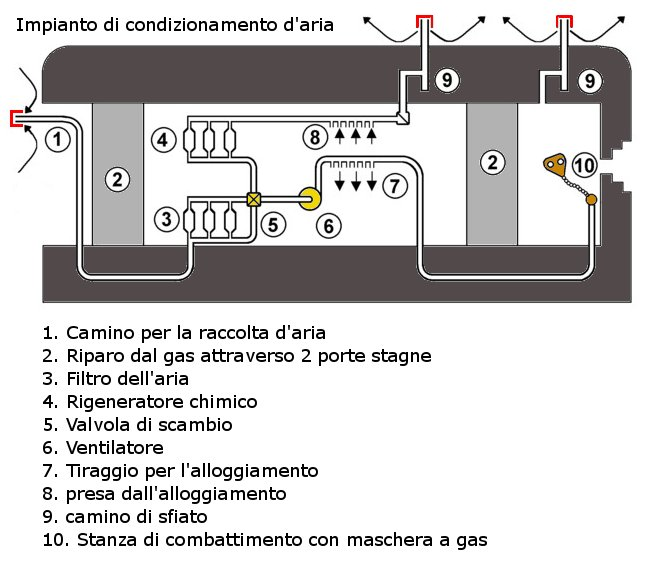 schema condiz aria